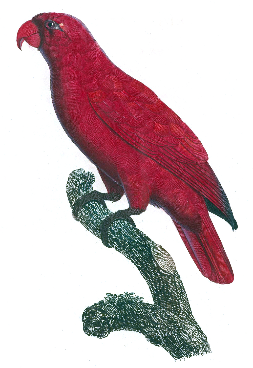 Plate 125: Le Perroquet Lori unicolore. Illustrations from Histoire naturelle des perroquets. Written by François Le Vaillant. Volume II (1805).